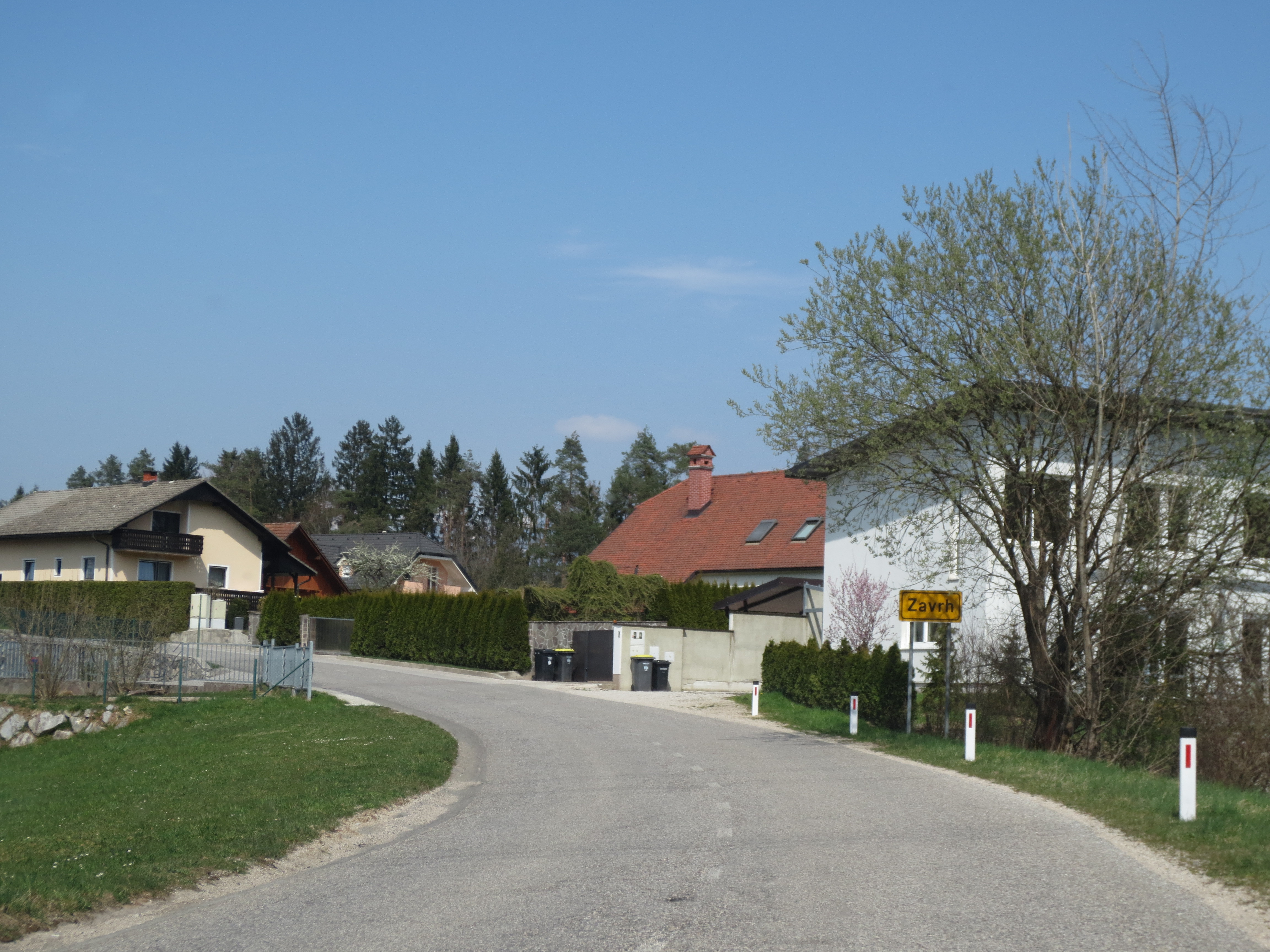 Zavrh